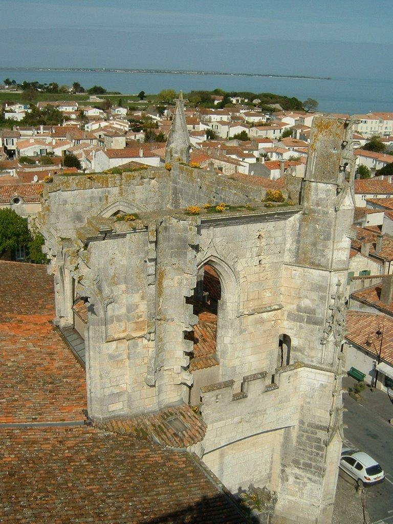 Saint Martin de Ré (Ile de Ré, Charente-Maritime, France) : église Saint Martin : vestiges du croisillon nord du transept depuis le clocher.